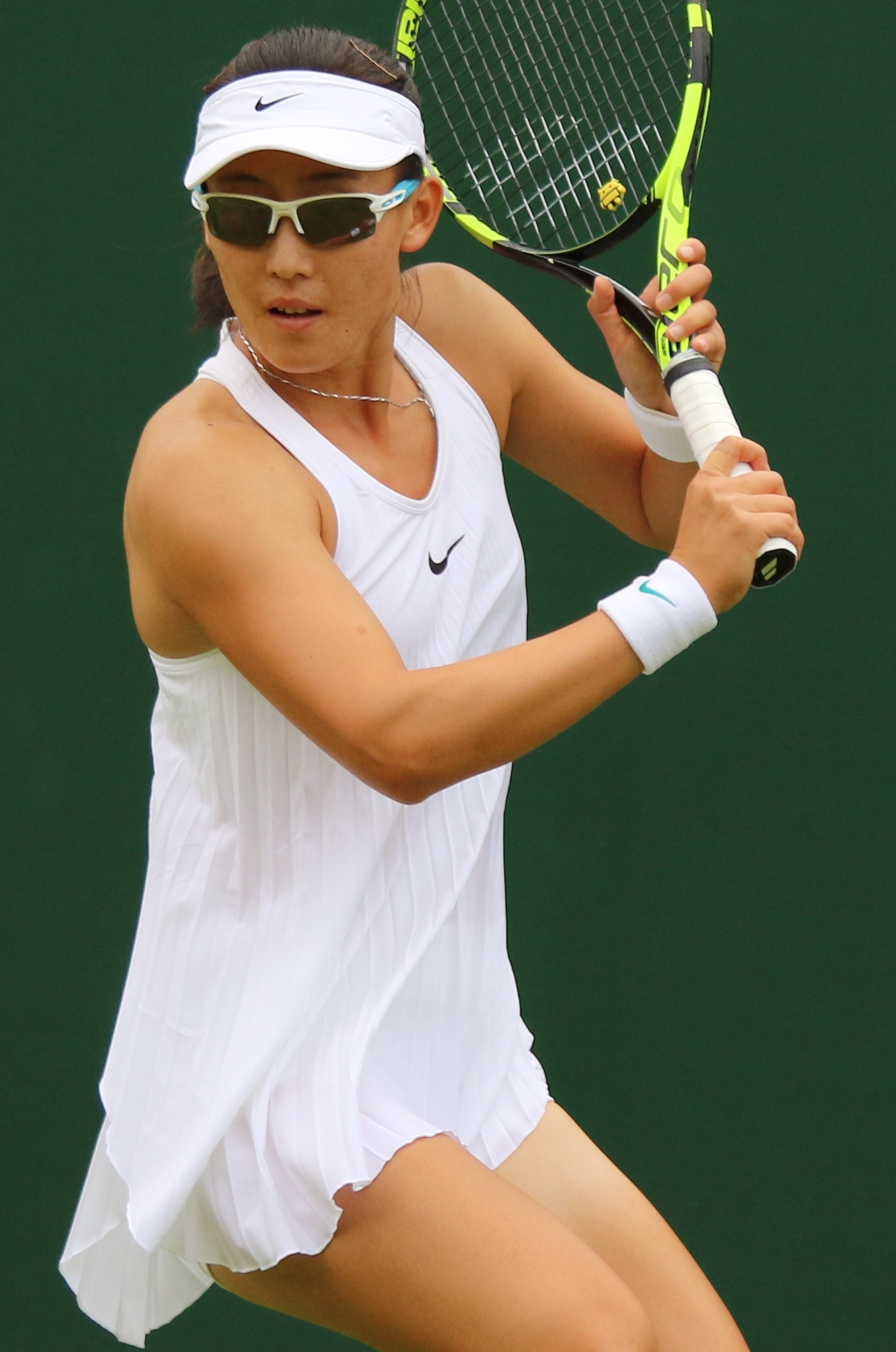 Zheng S. WM16 (5)